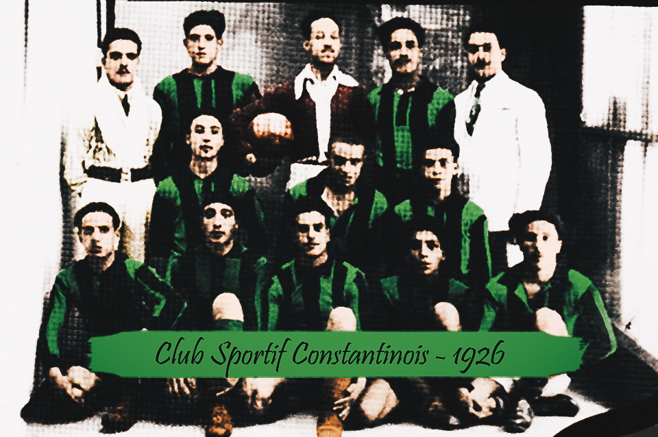 Le Club Sportif Constantinois section football 1926. retoucher et colorier par A.M